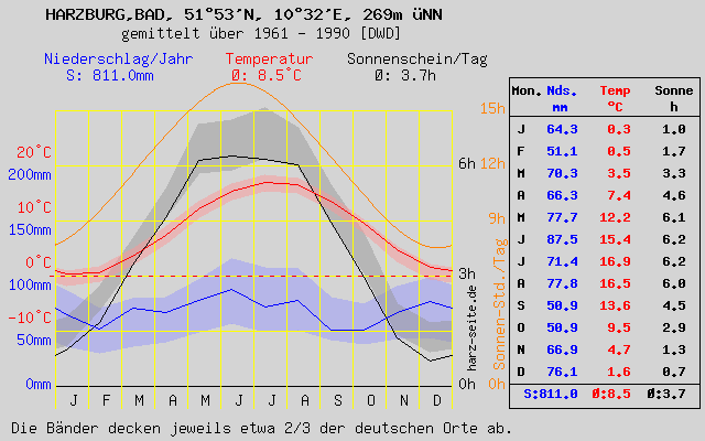 Das Klimadiagramm für Bad Harzburg basieren auf den frei zugänglichen Messdaten des Deutsche Wetterdienstes. Sie wurden zwischen 1961 und 1990 erfasst und gemittelt. Jeder Monatswert der Tabelle ist also der Mittelwert über einen Zeitraum von 30 Jahren. Folgende Monatswerte sind vorhanden: die Niederschlagsmenge in mm/Monat die Sonnenscheindauer in Stunden/Tag die Temperatur in °C Zusätzlich ist in Orange die Breitengrad abhängige Zeit zwischen Sonnenaufgang und -untergang in Std./Tag angegeben. Die Formel basiert auf der Facharbeit von T. Raffler. Die Linien geben die Monatswerte des gewählten Ortes an. Um diese Ortsdaten innerhalb Deutschlands vergleichbar zu machen, sind die Bänder hinzugefügt. Sie enthalten den deutschen, mit einer Streuung überlagerten, Durchschnittswert. Die Steuung ist derart gewählt, dass sich etwa 2/3 der deutschen Orte in dem jeweiligen Band befinden: (Mittelwert ± Standardabweichung). Liegt die Linie innerhalb eines Bandes, so verhält sich der Ort bezüglich seiner Monatswerte, wie 2/3 der deutschen Orte, also "normal". Starke Abweichungen finden wir z.B. in den Bergen mit viel Niederschlag oder an der Nordsee mit antizyklischem Niederschlag.